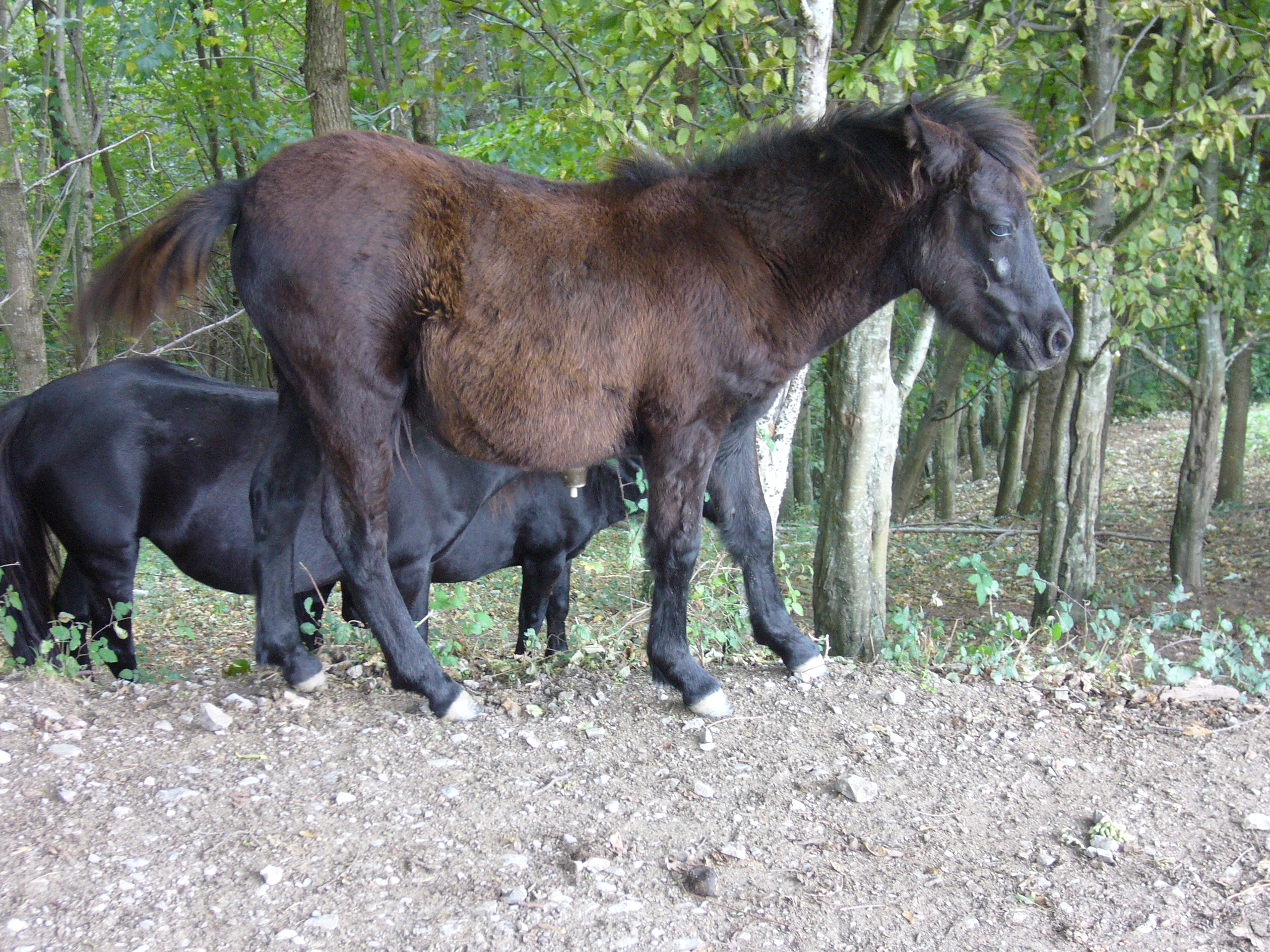 Pottoka moxala